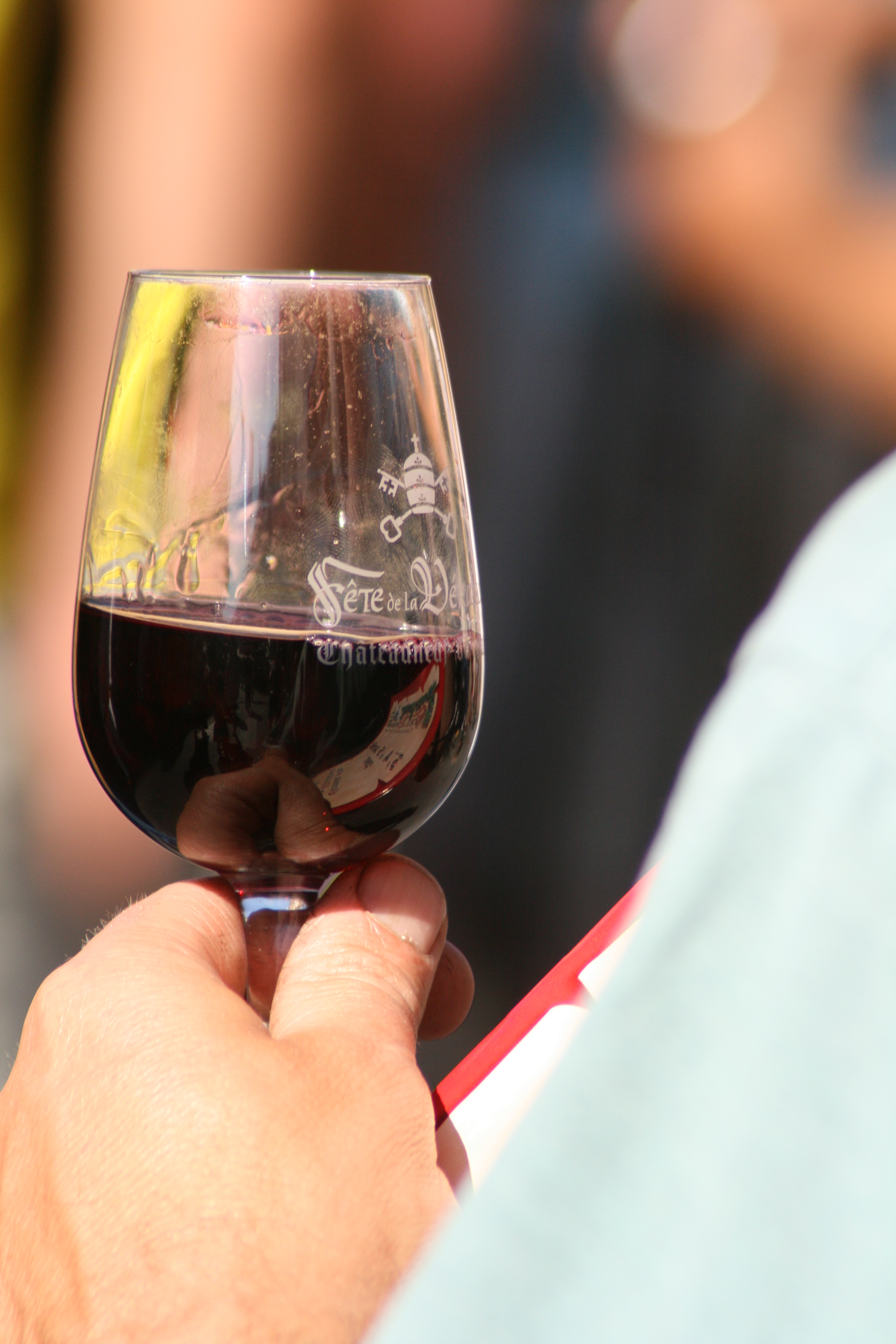 La fête de la véraison est l'occasion de déguster les production viticole locales et d'avoir des animations de type médiévales.